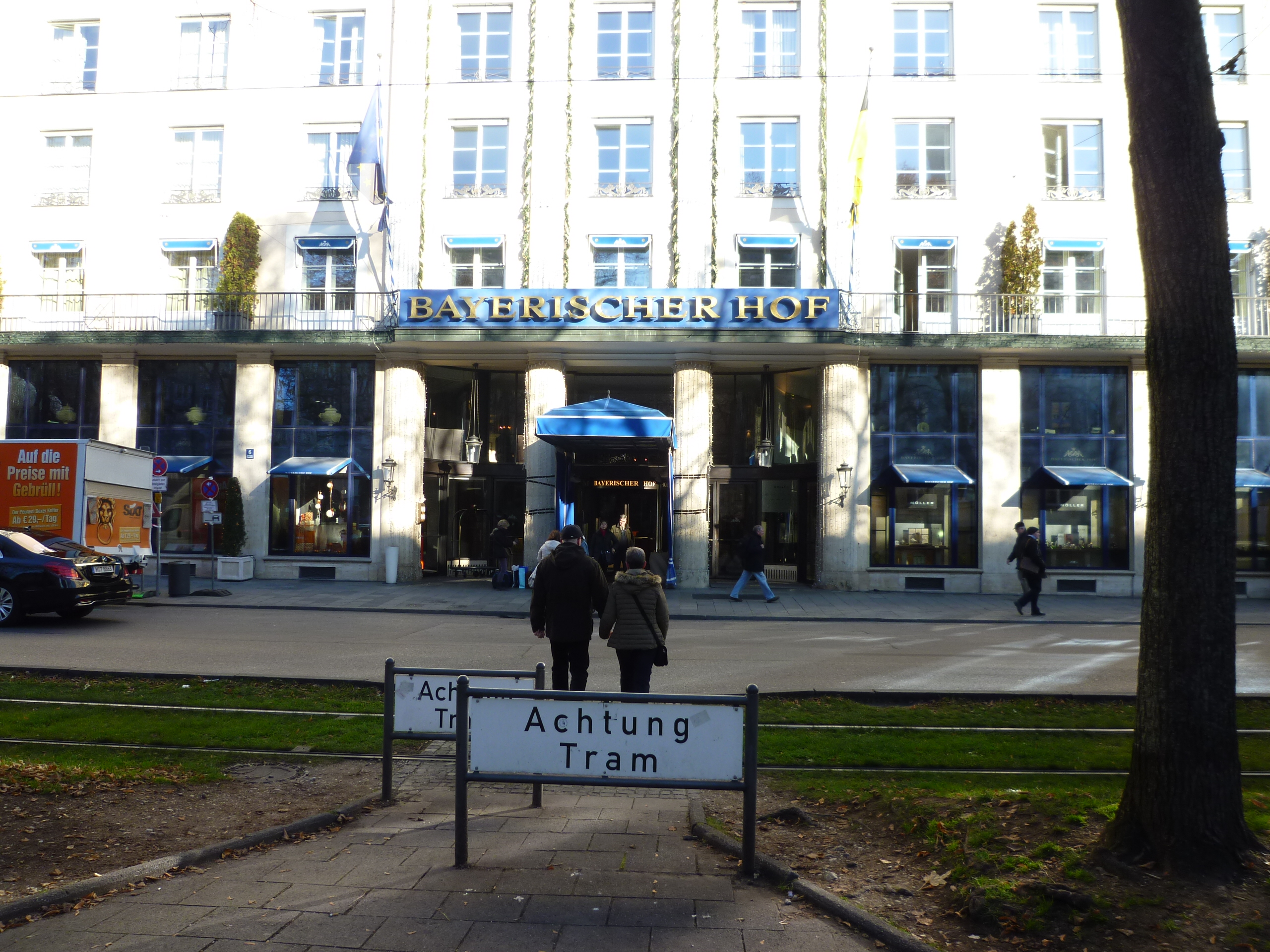 Hotel "Bayerischer Hof" in München; Eingangsbereich.